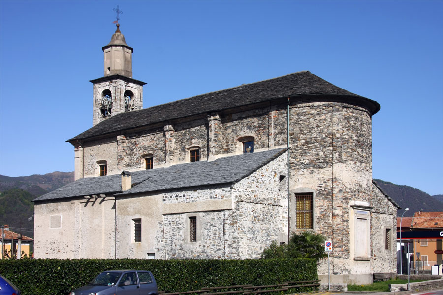 Parrocchiale dei Santi Audenzio e Caterina a Pettenasco (NO)